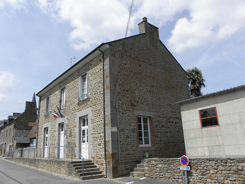 Mairie de Noyal-sous-Bazouges (35=